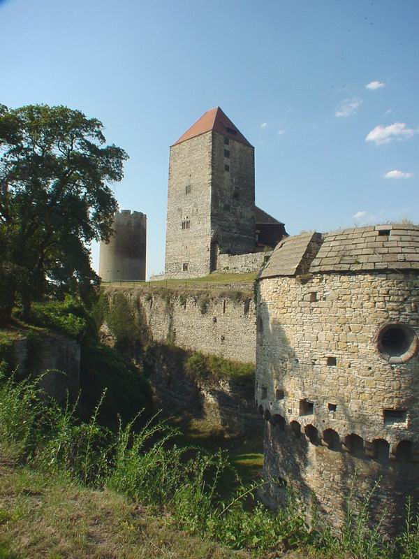 Burg Querfurt, eigenes Foto public domain Südbastion